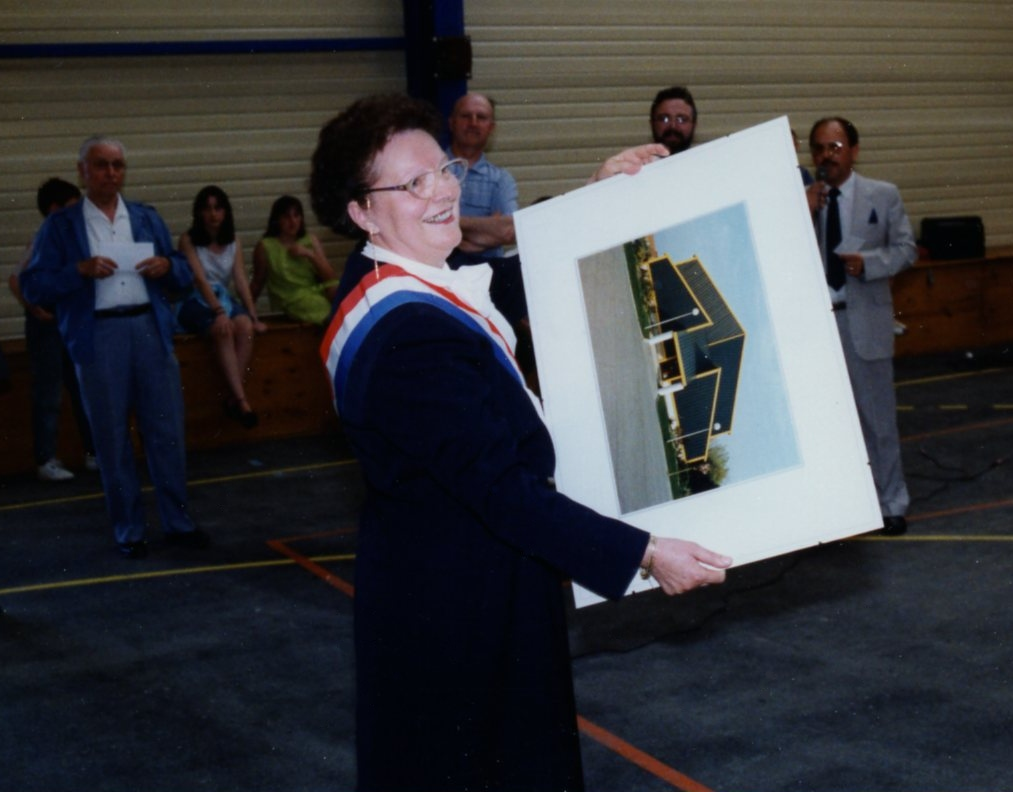 Anne-Marie Chevalier, maire de Brouckerque, en 1990, à l'inauguration de la salle polyvalente qui porte son nom.